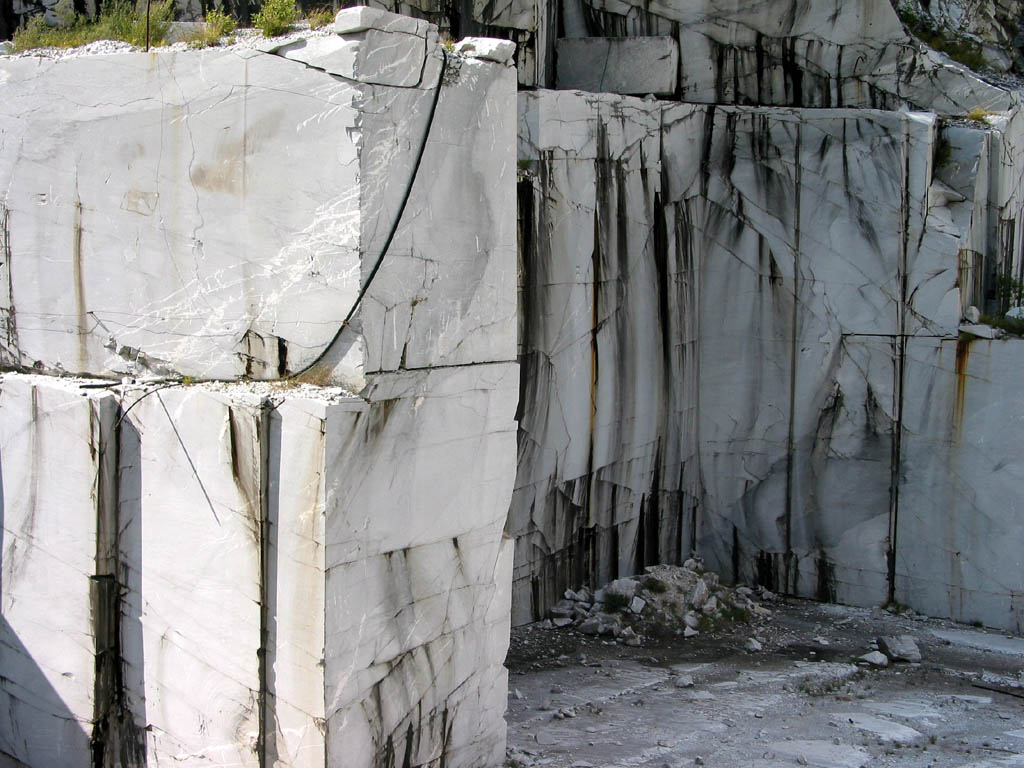 deserted marble quarry